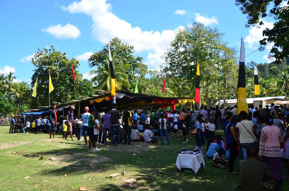 Besuch des Präsidenten Taur Matan Ruak in Irabin de Baixo